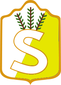 Pohjois-Uudenmaan suojeluskuntapiirin käsivarsikilpi, joka oli käytössä vuosina 1919-1945.